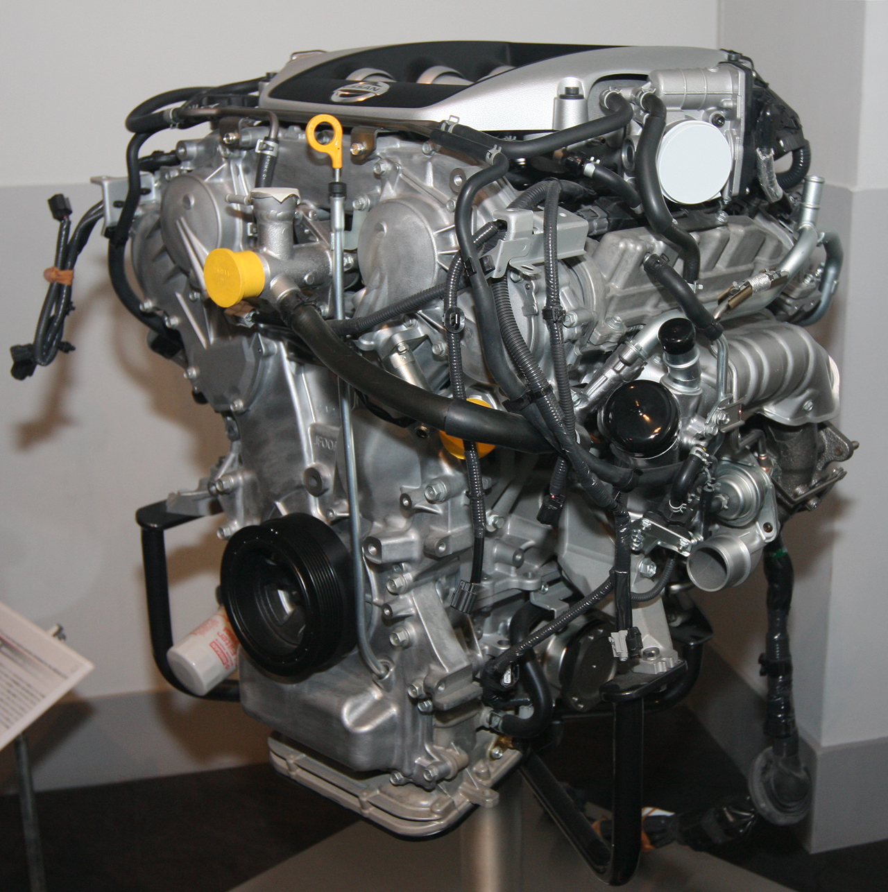 2007 Nissan VR38DETT engine. V6 3,799cc